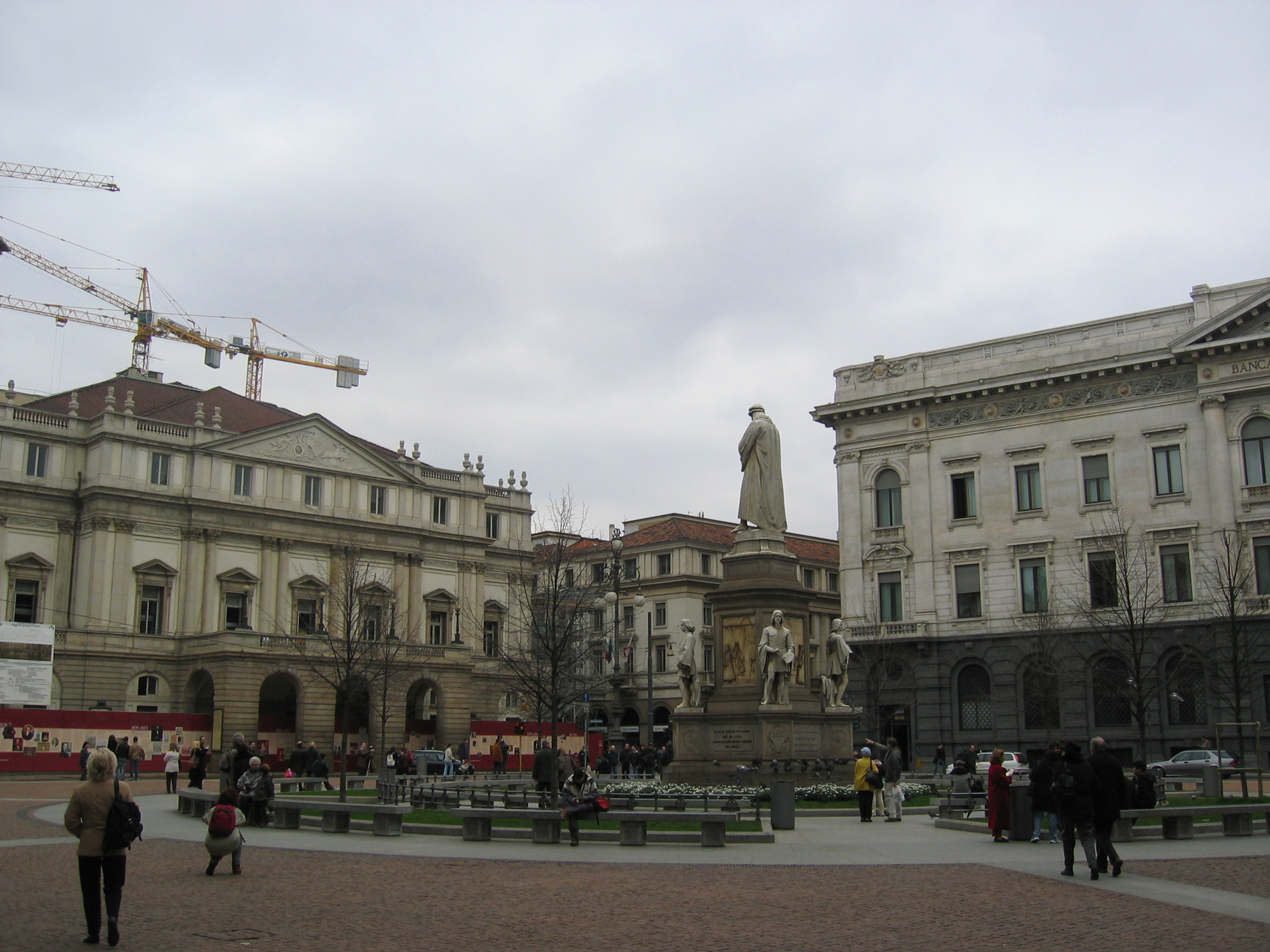 Piazza della Scala, Milano (Italy)